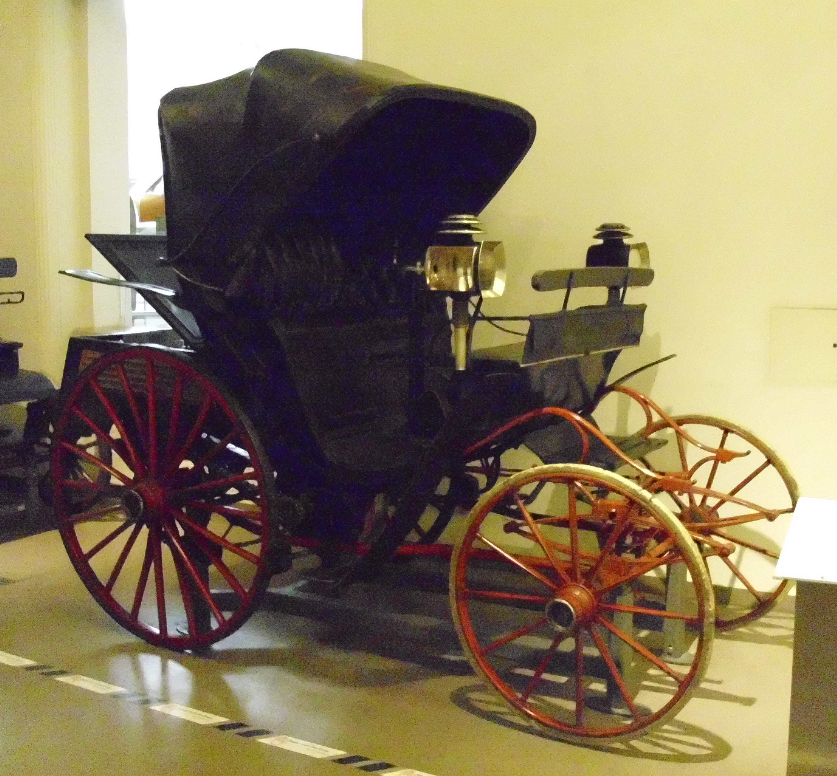 Benz Modell 3 1893 Umbau zum Vierrad 1898 durch Anwander